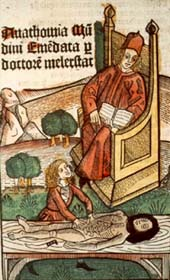 Mondino dei Luzzi, Titelbild von Anathomia Mundini Emèdata p doctoré melerstat ("Anatomie des Mundinus. Herausgegeben von Doktor Mellrichstadt", 1493. doctoré melerstat = Martin Pollich.